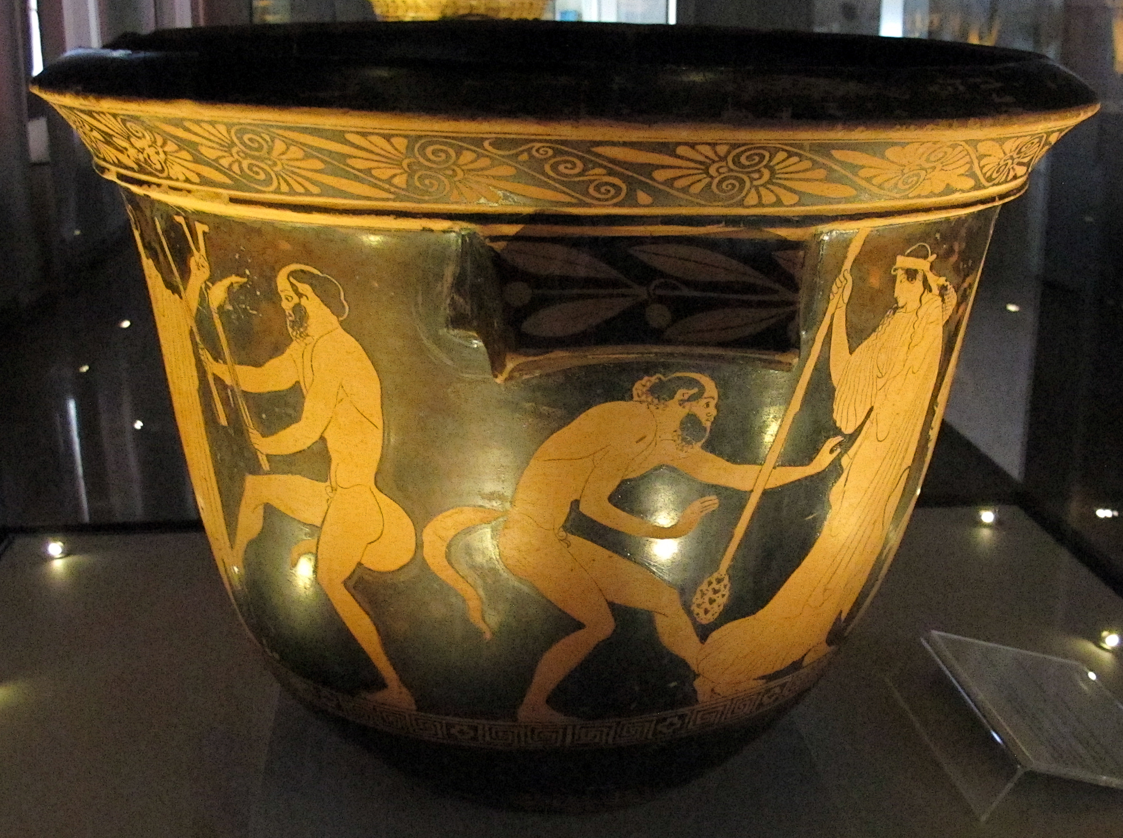 Museo Archeologico Nazionale - MIBAC This is a photo of a monument which is part of cultural heritage of Italy.